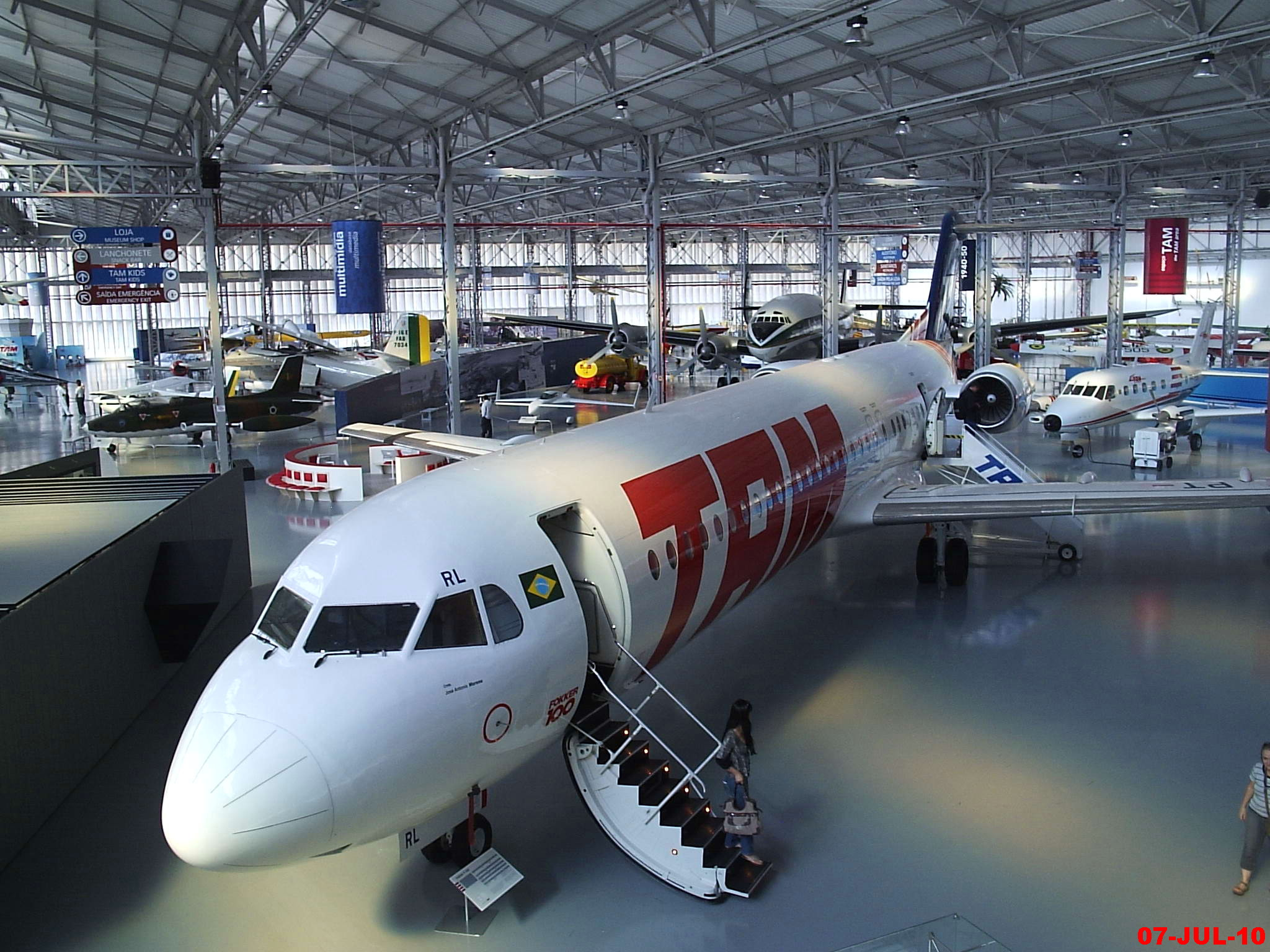 Fokker 100(Sendo Possivel visitar por dentro) em posição de destaque na entrada do Museu TAM - Este Fokker fez um pouso de barriga no aeroporto de Campinas em 2002 - PT-MLR - Museu TAM